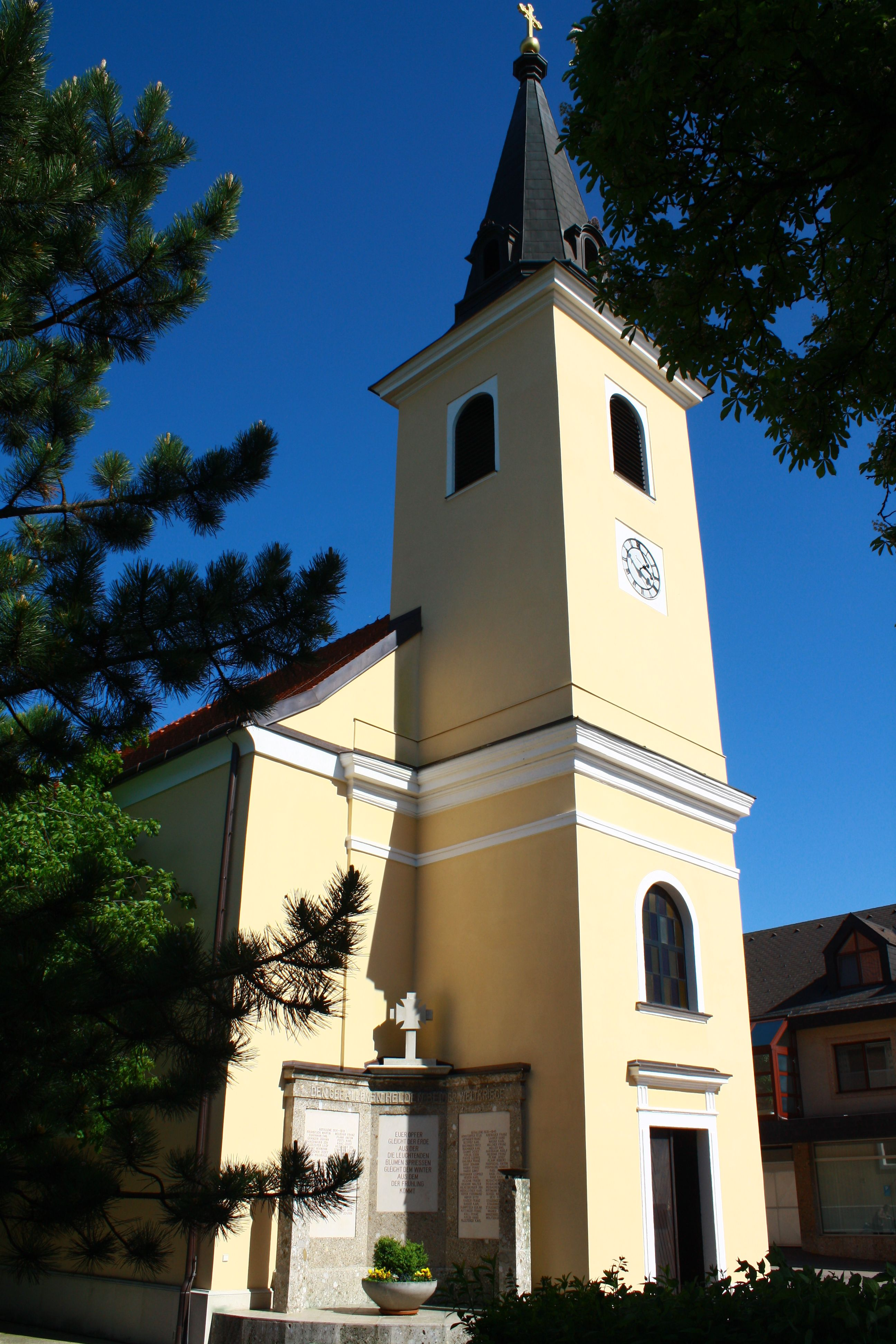 Kirche in Günselsdorf in Niederösterreich